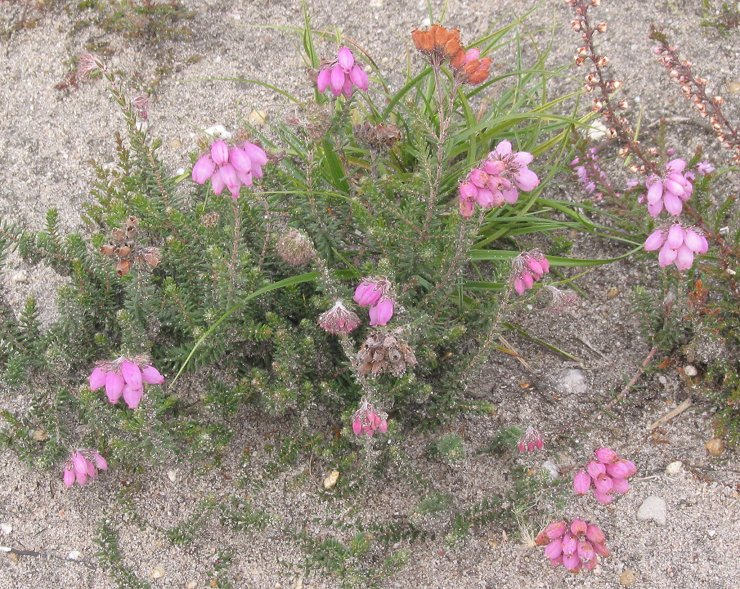 Gewone dophei; half september.